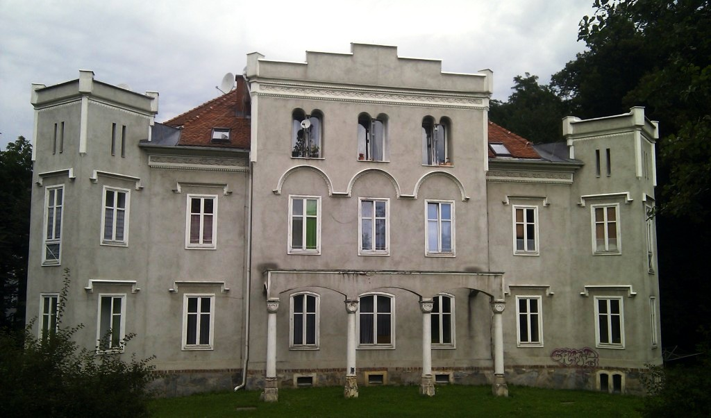 Schloss Schönau/Tupay-Schlössl, Graz-Jakomini